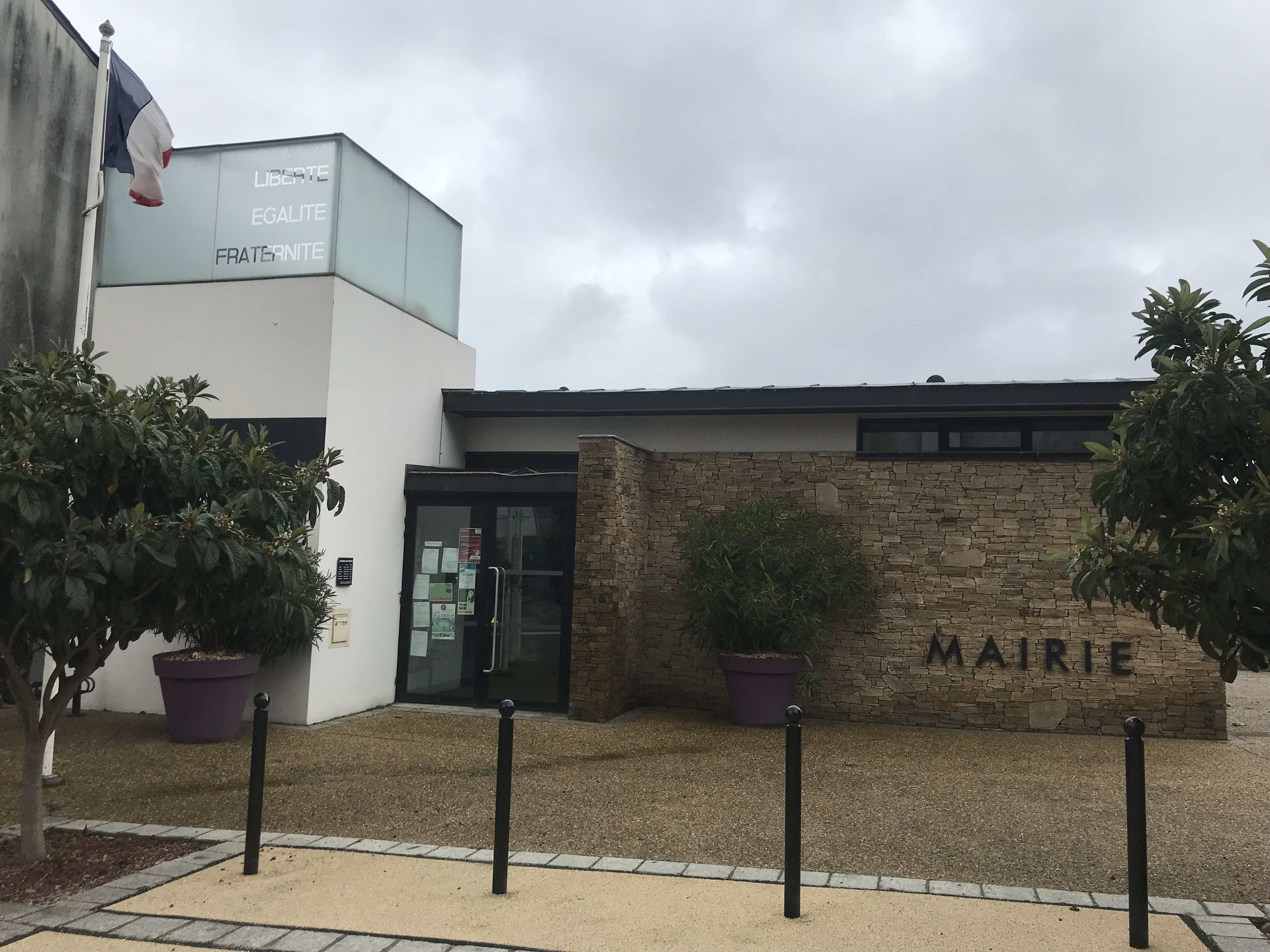 Mairie déléguée de Bouzillé (Maine-et-Loire, France).